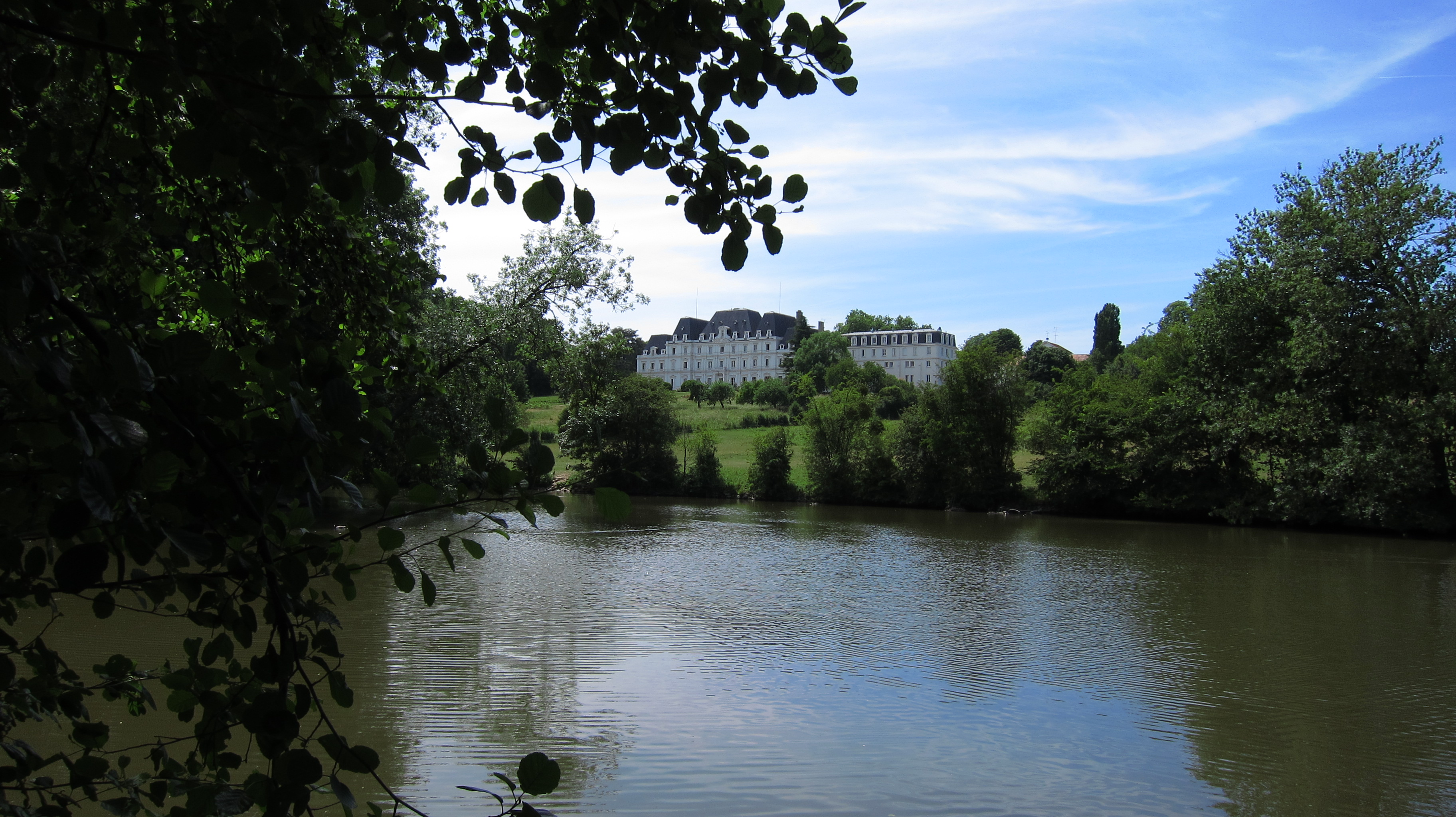 Longpont-sur-Orge (Essonne, France) - Bassin de Lormoy et château de Lormoy dans le parc de Lormoy.